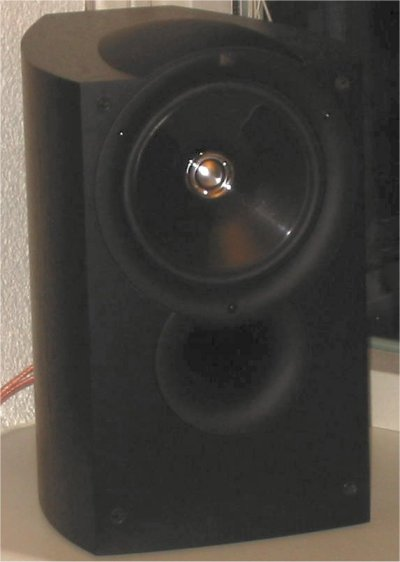 Bassreflexlautsprecher